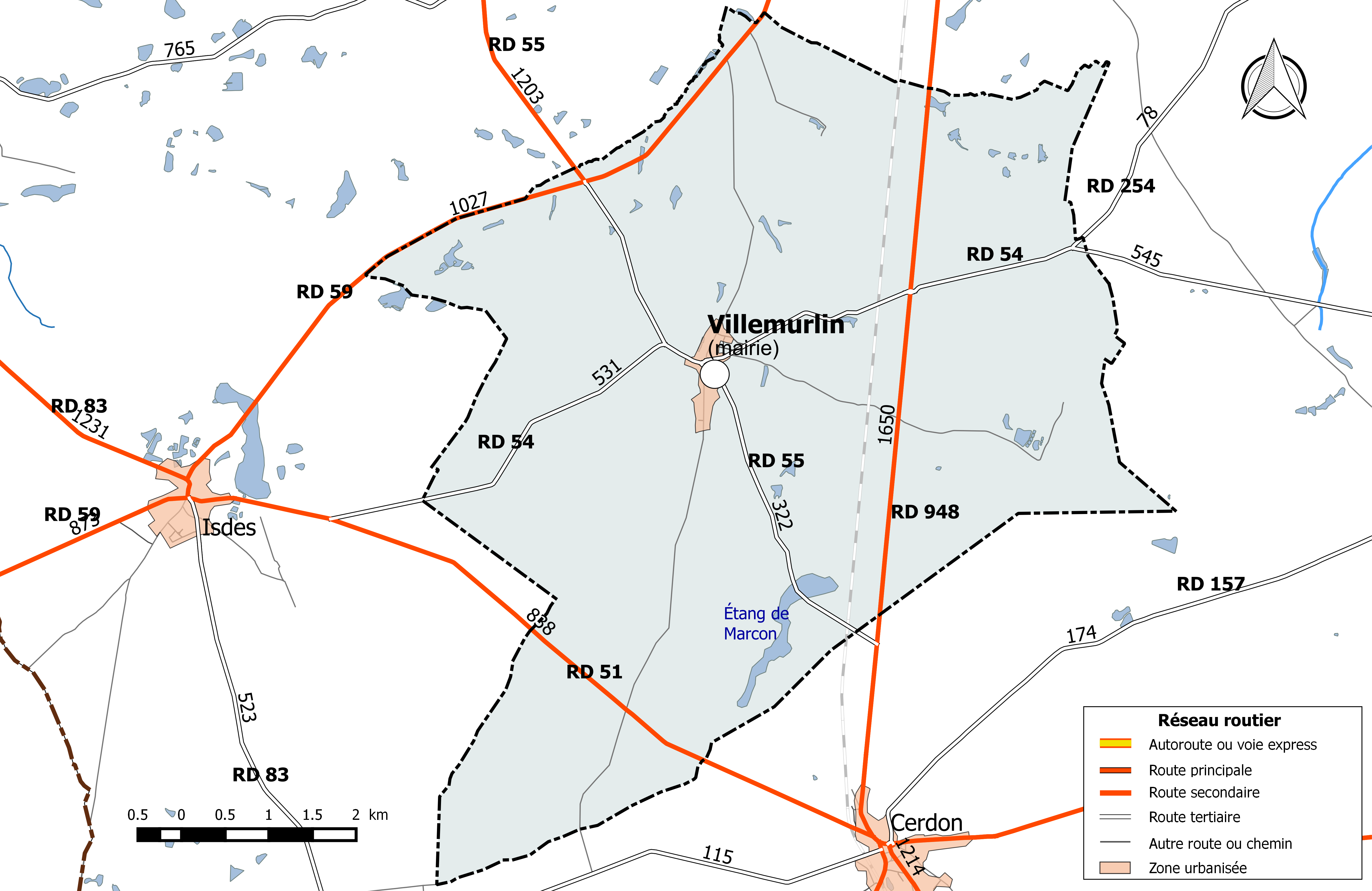 Carte du réseau routier de la commune de Villemurlin.